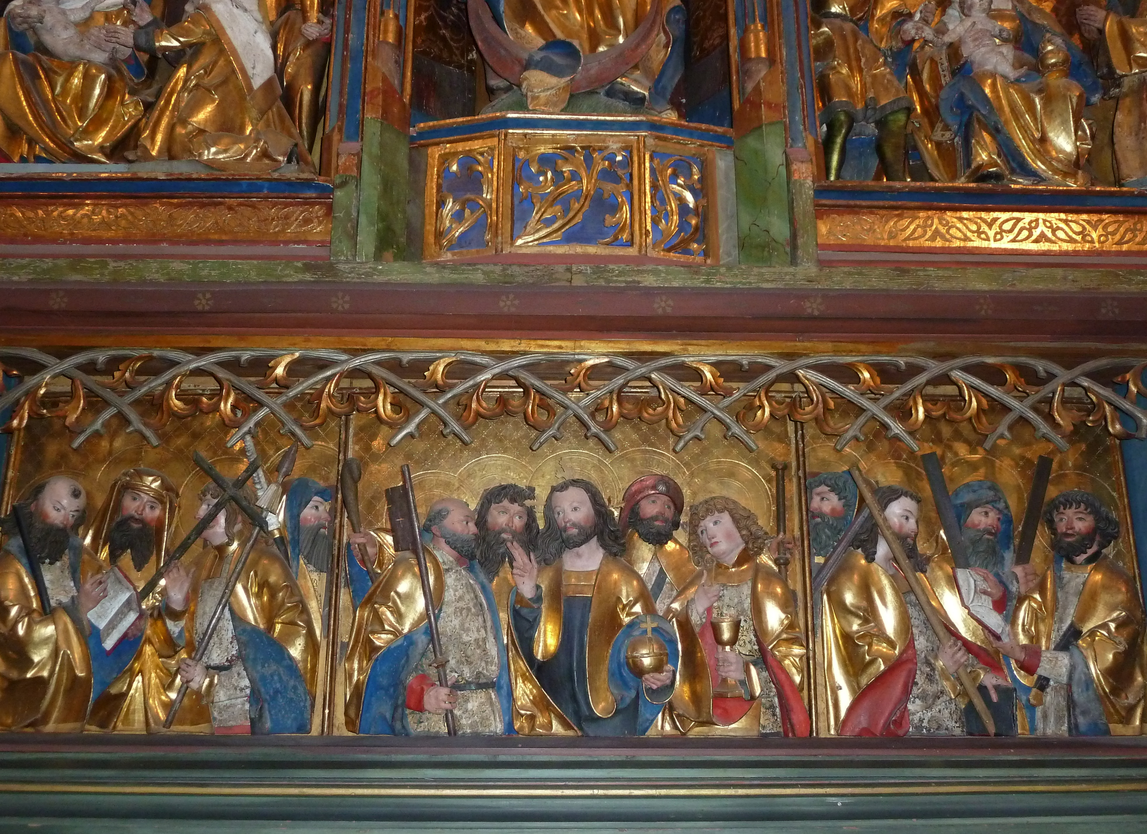 Jesus und die 12 Apostel an einem Flügelaltar aus der Kirche Sta. Maria Assunta Calanca, Graubünden, Schweiz. Lindenholz, vergoldet. Historisches Museum Baseel, Barfüsserkirche.